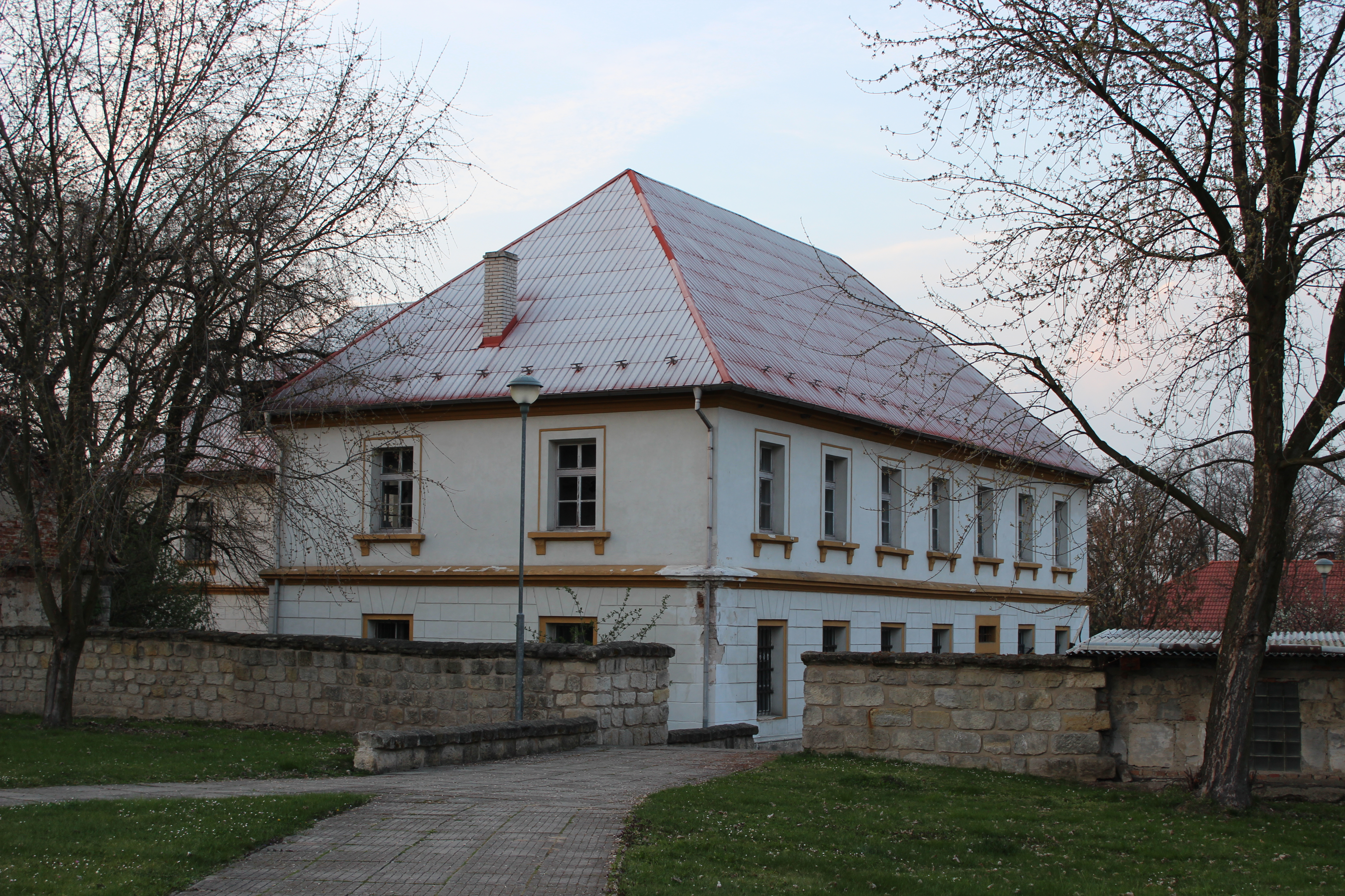 Zámek (dům číslo popisné 18) ve Velkých Všelisech (pohled od jihovýchodu). This photograph was taken with a Canon EOS 600D.